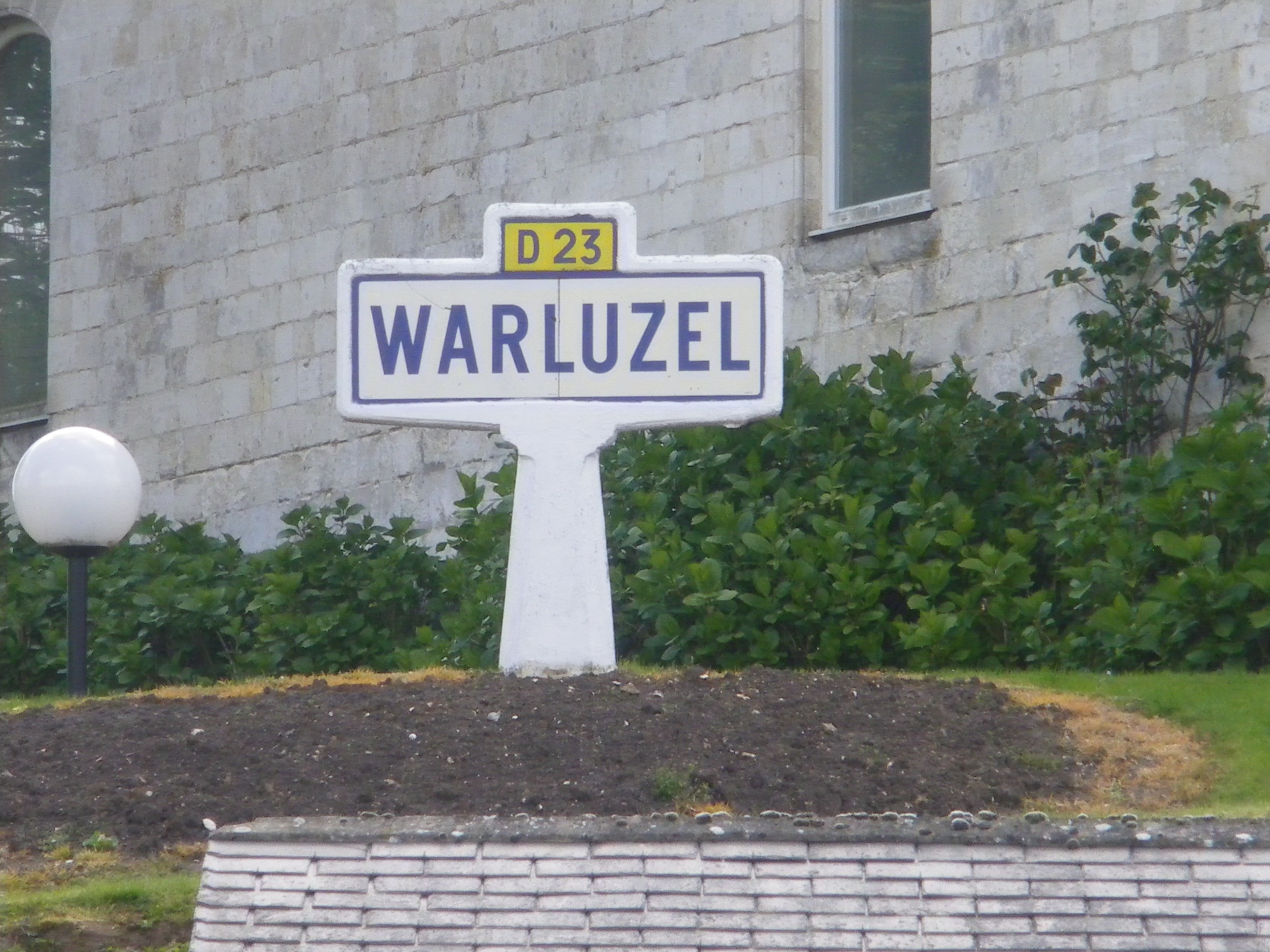 Un panneau d'entrée de la commune de Warluzel placé au centre de cette commune.